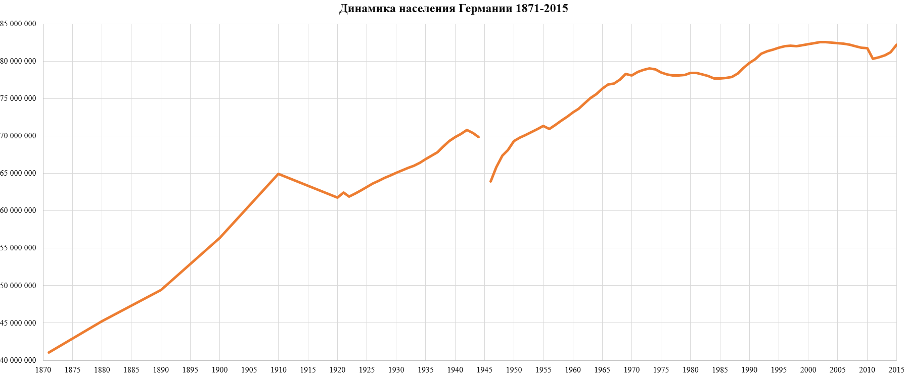 Население Германии 1871-2015